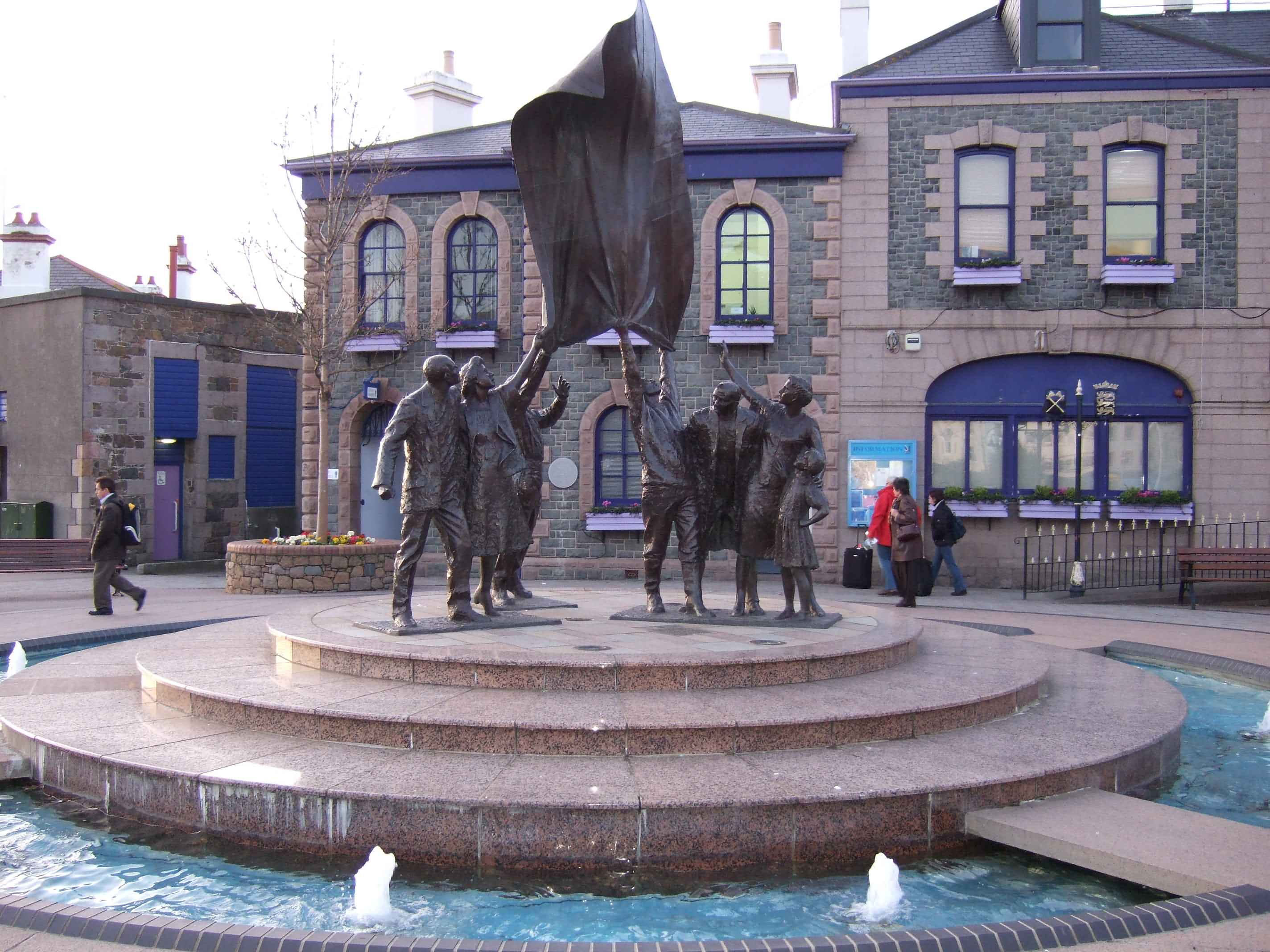 Liberation Square, St. Helier, Jersey